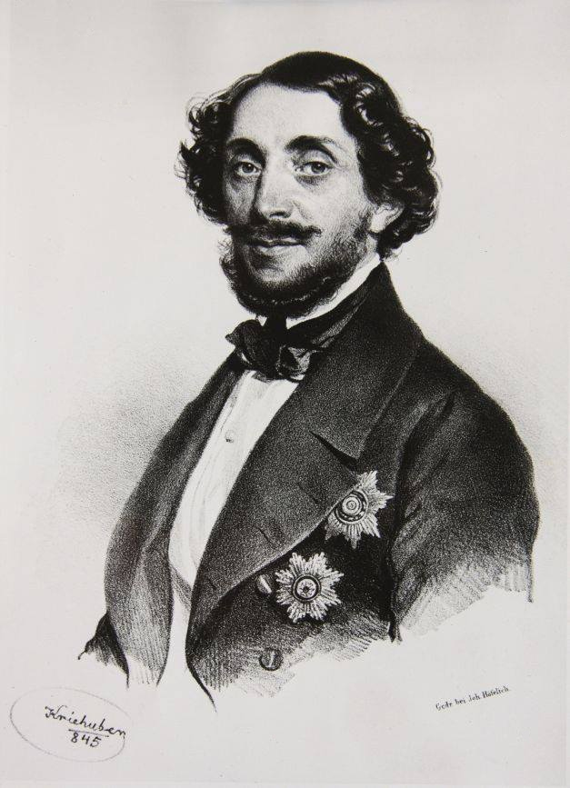 Barbu Dimitrie Știrbei (1845) — Bukarest, Wallachia.